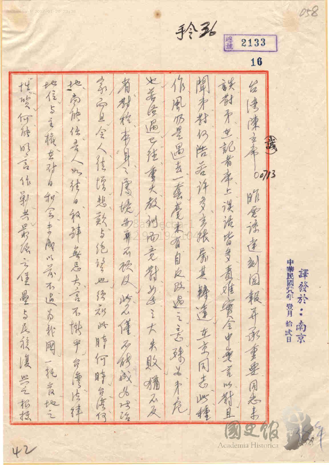 蔣中正電責陳誠記者會中「台灣為剿共堡壘」發言失當，應以中央政策為主張，免人誤解。其中提及台灣為中華民國託管地。